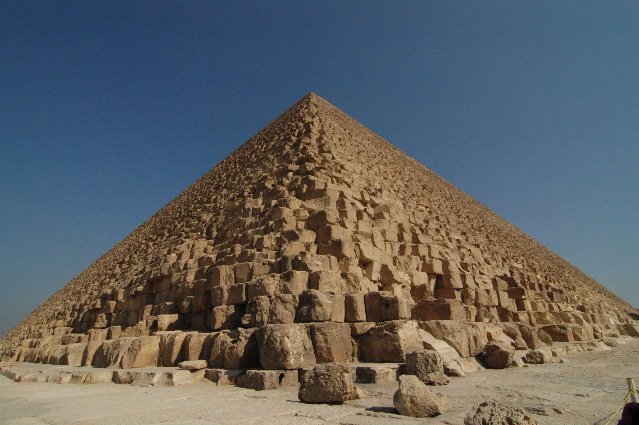 Giza: piramide di Cheope